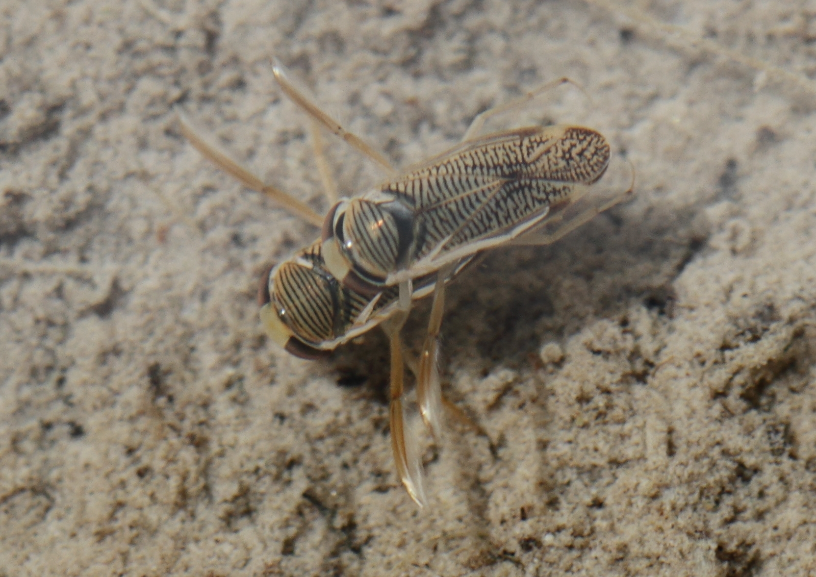 Ruderwanzen (Sigara striata) in der Steiermark in der Nähe des Hubertussees.